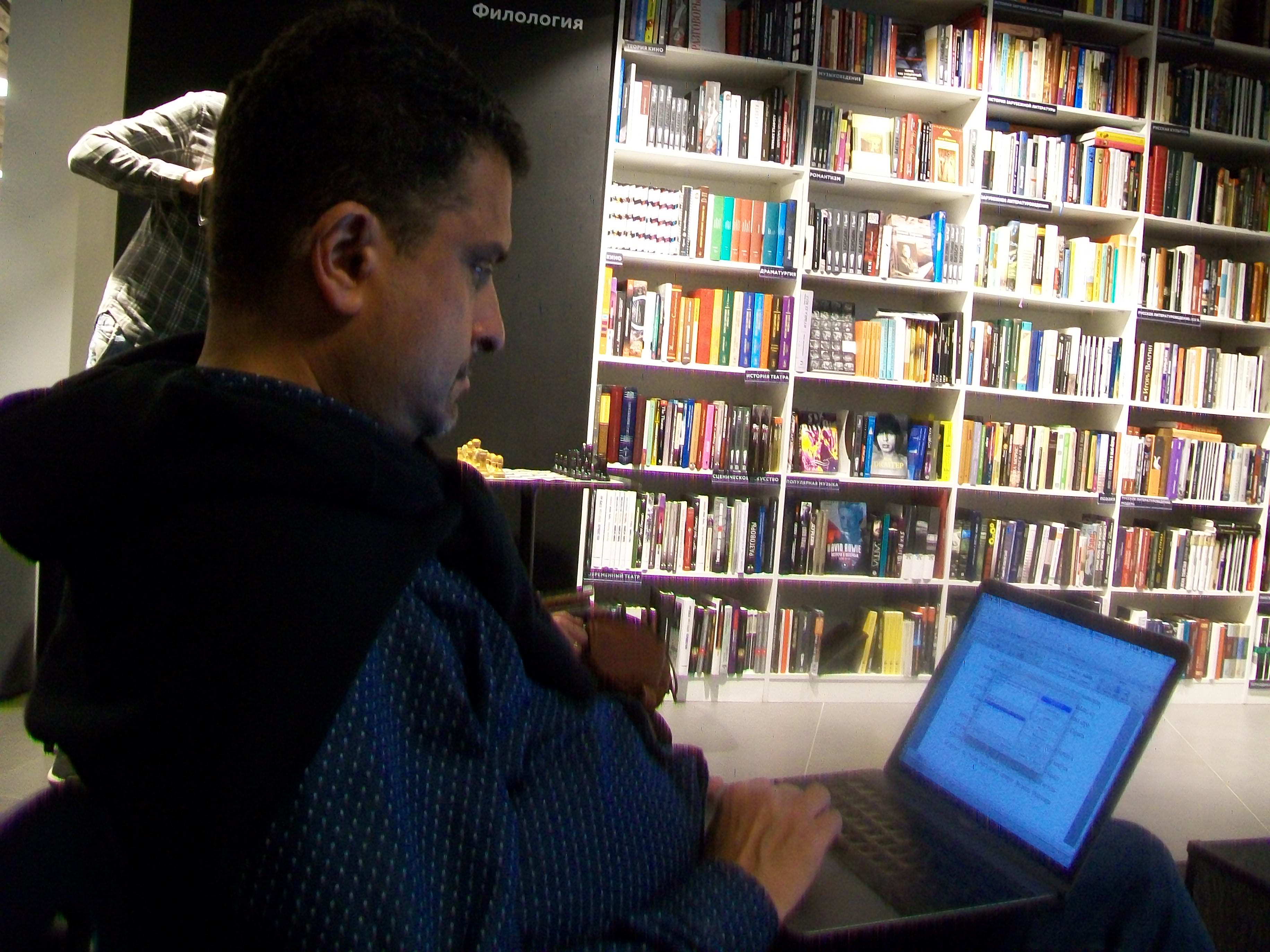 Александр Николаевич Архангельский в магазине "Пиотровский" в Ельцин-центре. 8 октября 2017 года